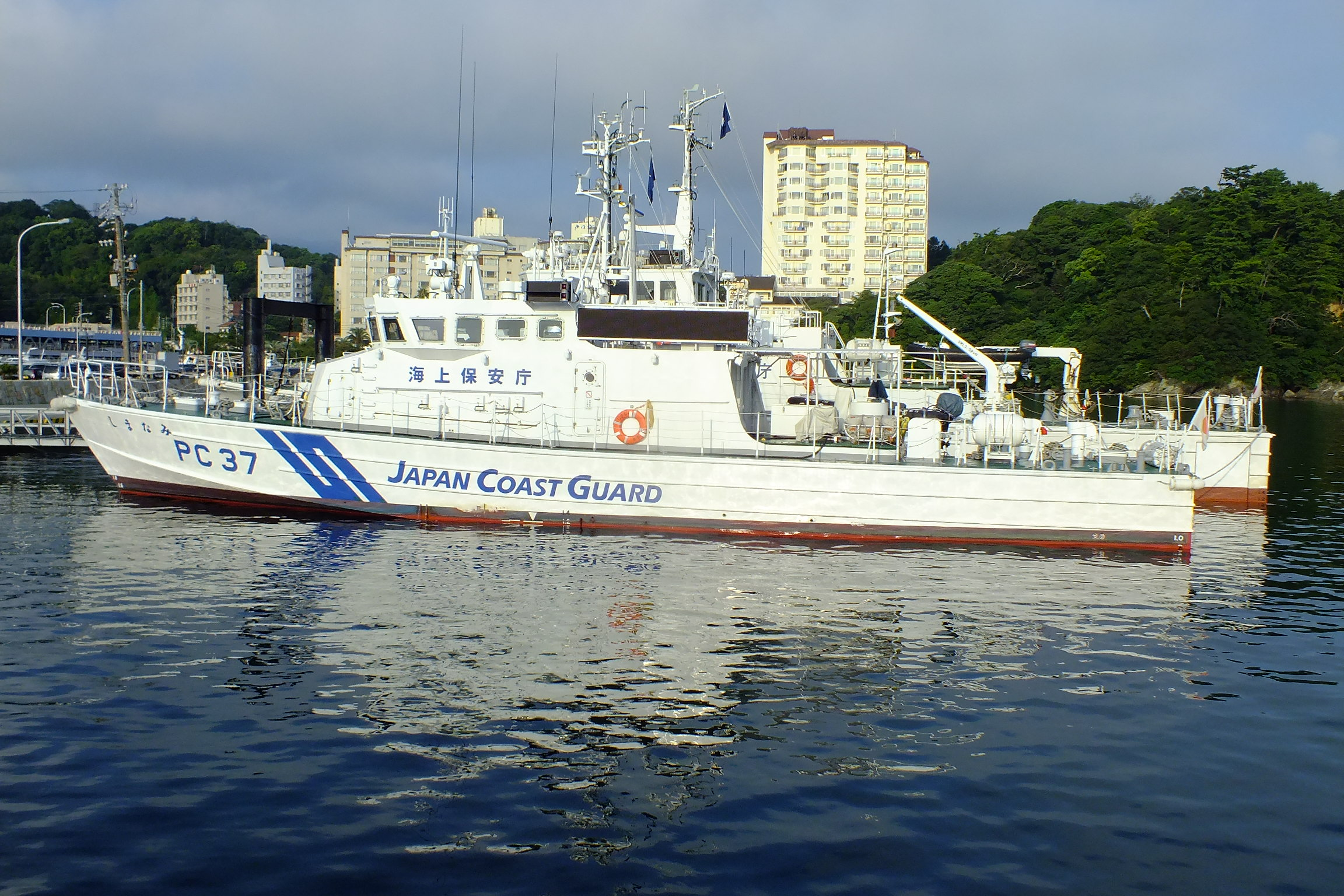 うらゆき（PC-33）、ゆうづき（PC-34）、いそづき（PC-35）、とばぎり（PC-36）、しまなみ（PC-37）、みねぐも（PC-38）